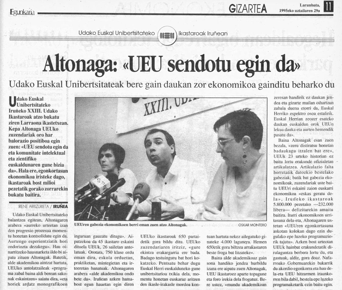 UEU 1995ko udako ikastaroen baloratzko prentsaurrekoan Menika, Altonaga eta Urkaregi. Euskaldunon Egunkarian.